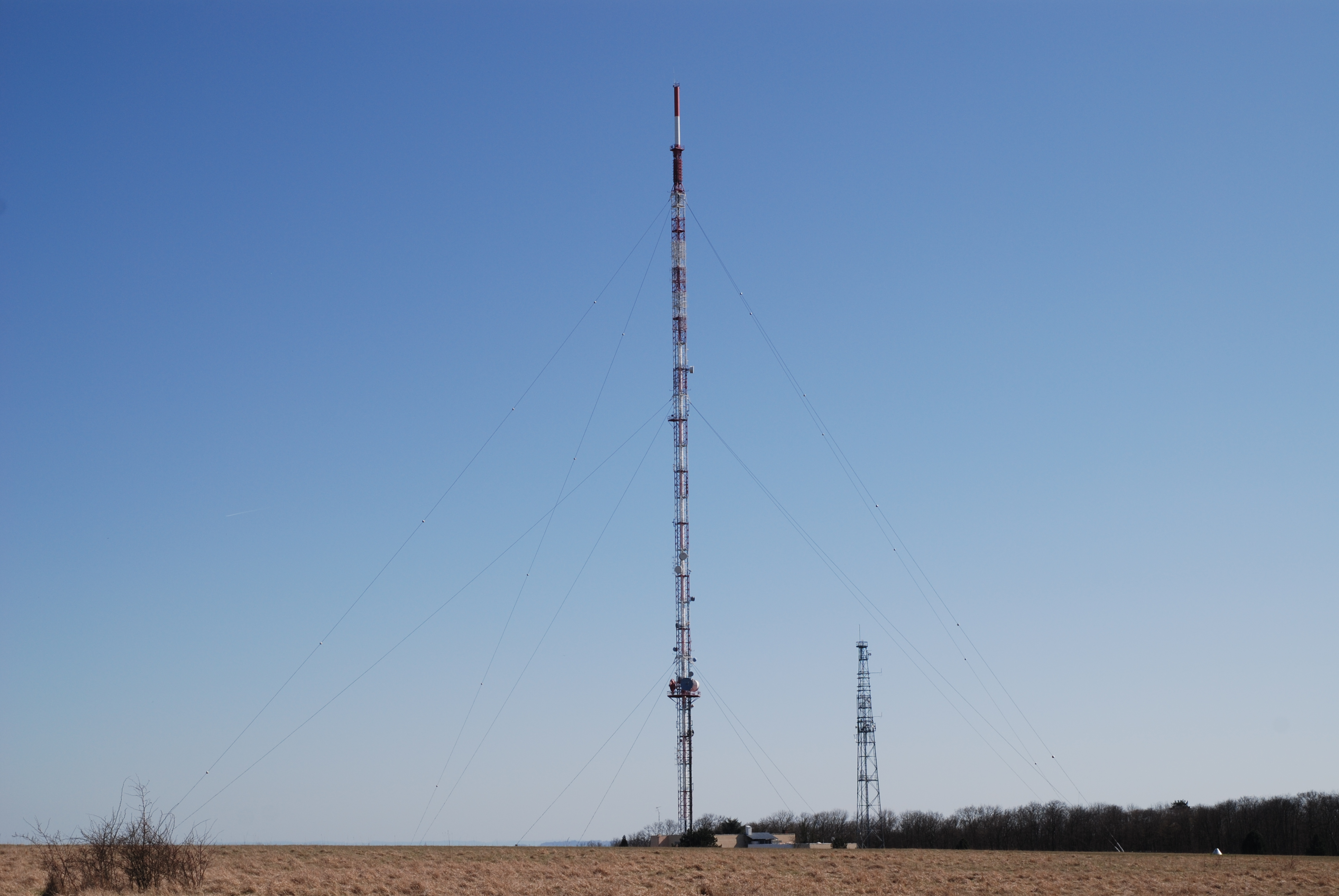 Vue de l'émetteur depuis le plateau de Malzéville, Meurthe-et-Moselle (54)